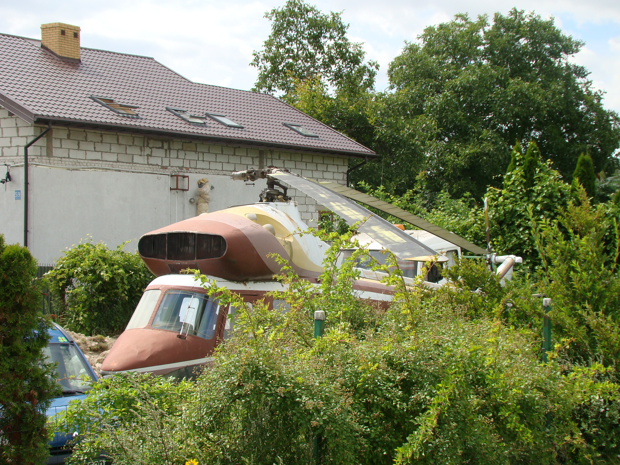 Makieta PZL Taurus II. Aktualnie w rękach prywatnych.